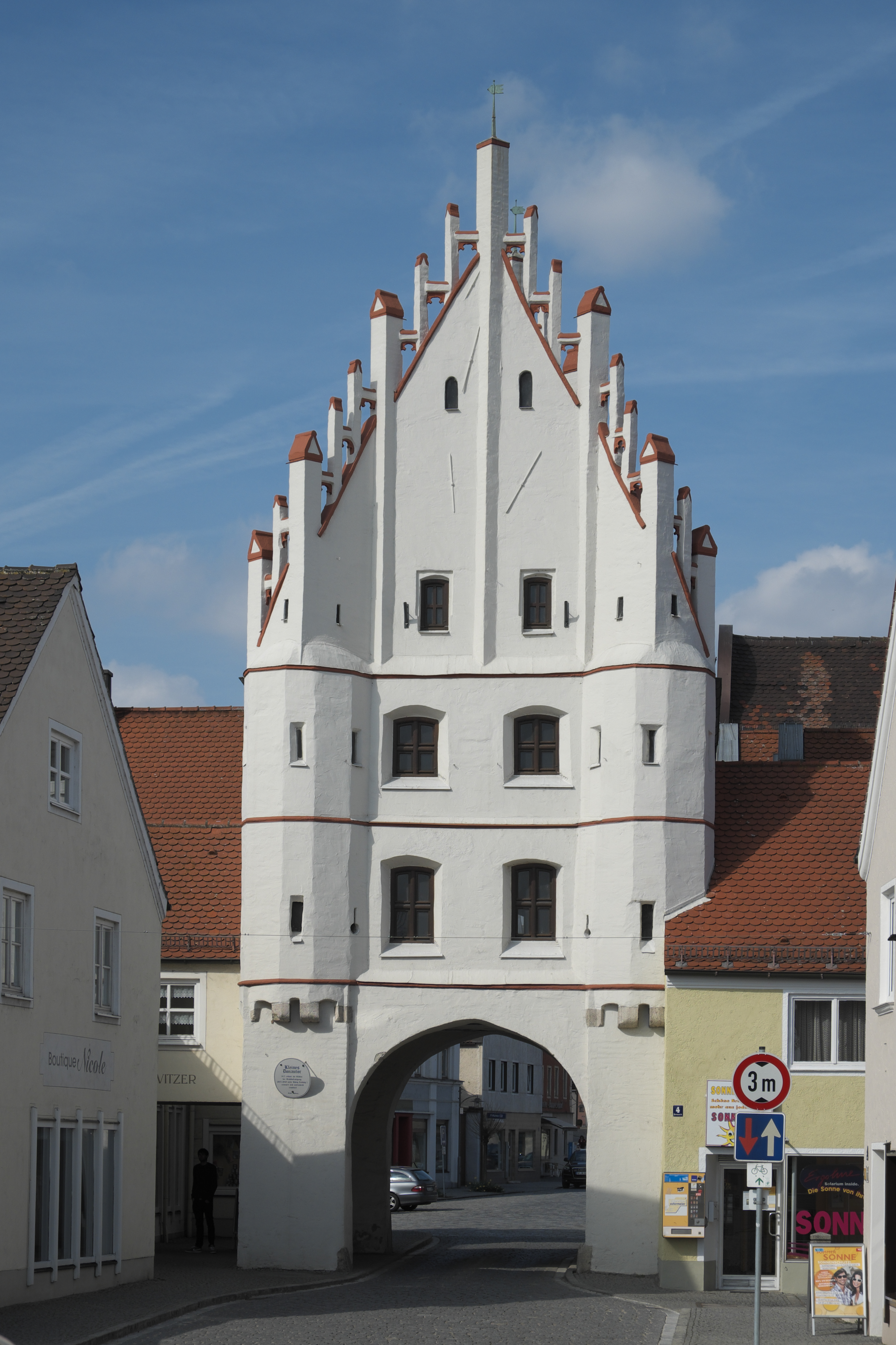 Kleines Donautor in Vohburg an der Donau im Landkreis Pfaffenhofen an der Ilm (Oberbayern/Bayern)